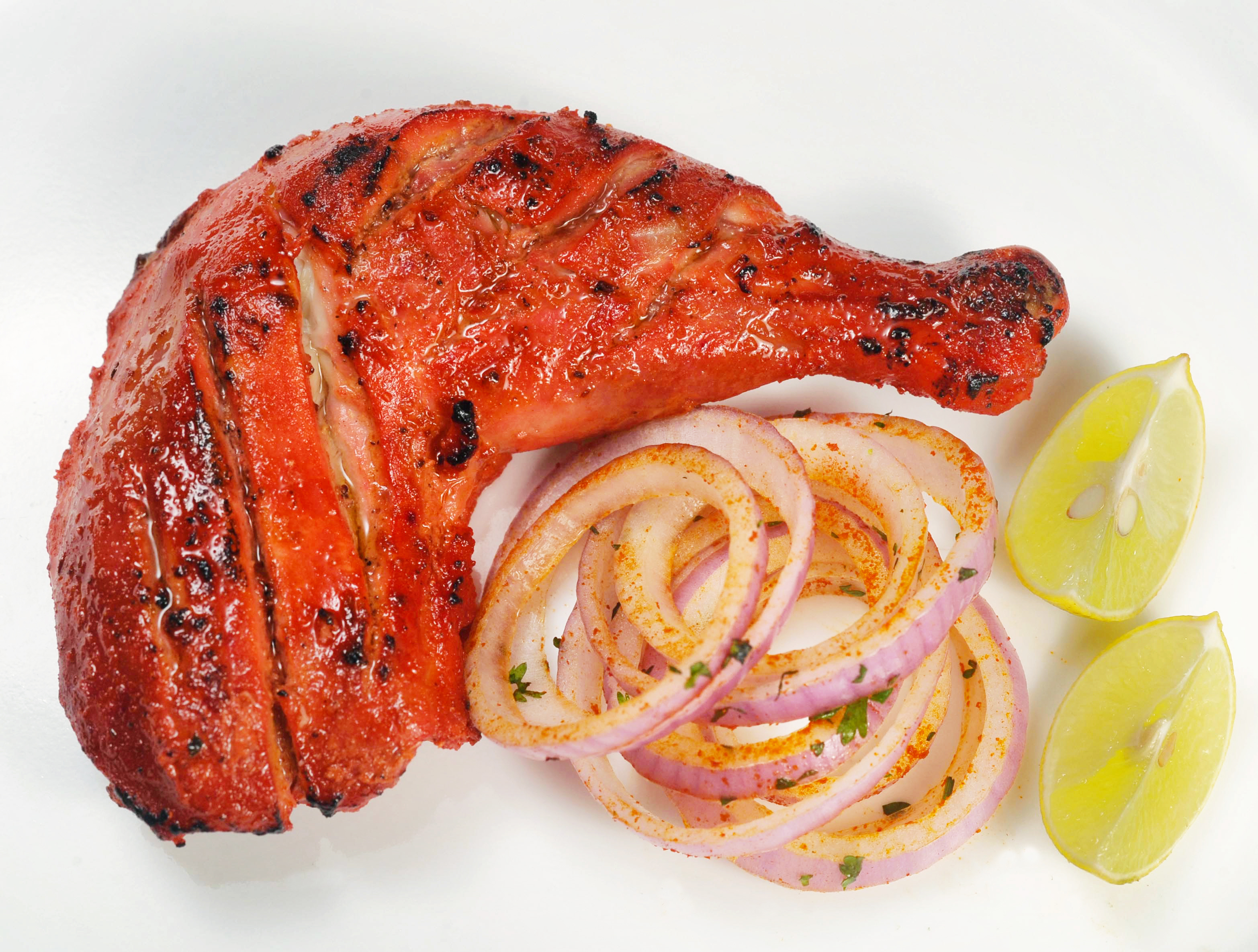 tandoori chicken laccha piyaz1